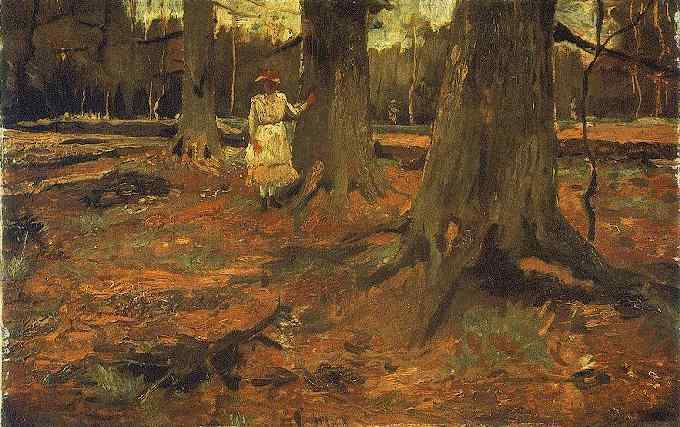 Pintura estancia en La Haya. Este es uno de los cuadros que marcan el inicio de Van Gogh como pintor